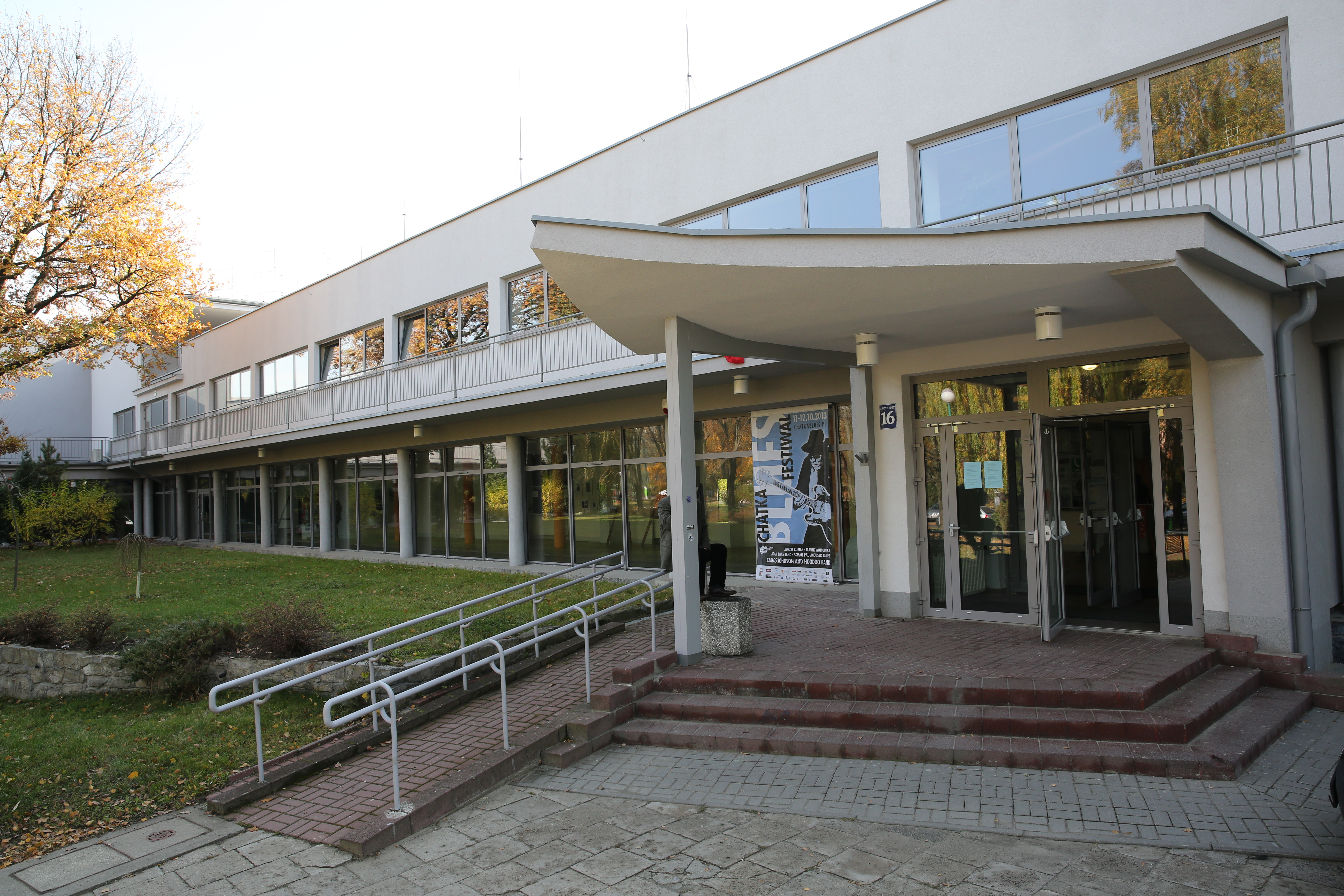 Wejście głowne do budynku Akademickiego Centrum Kultury UMCS